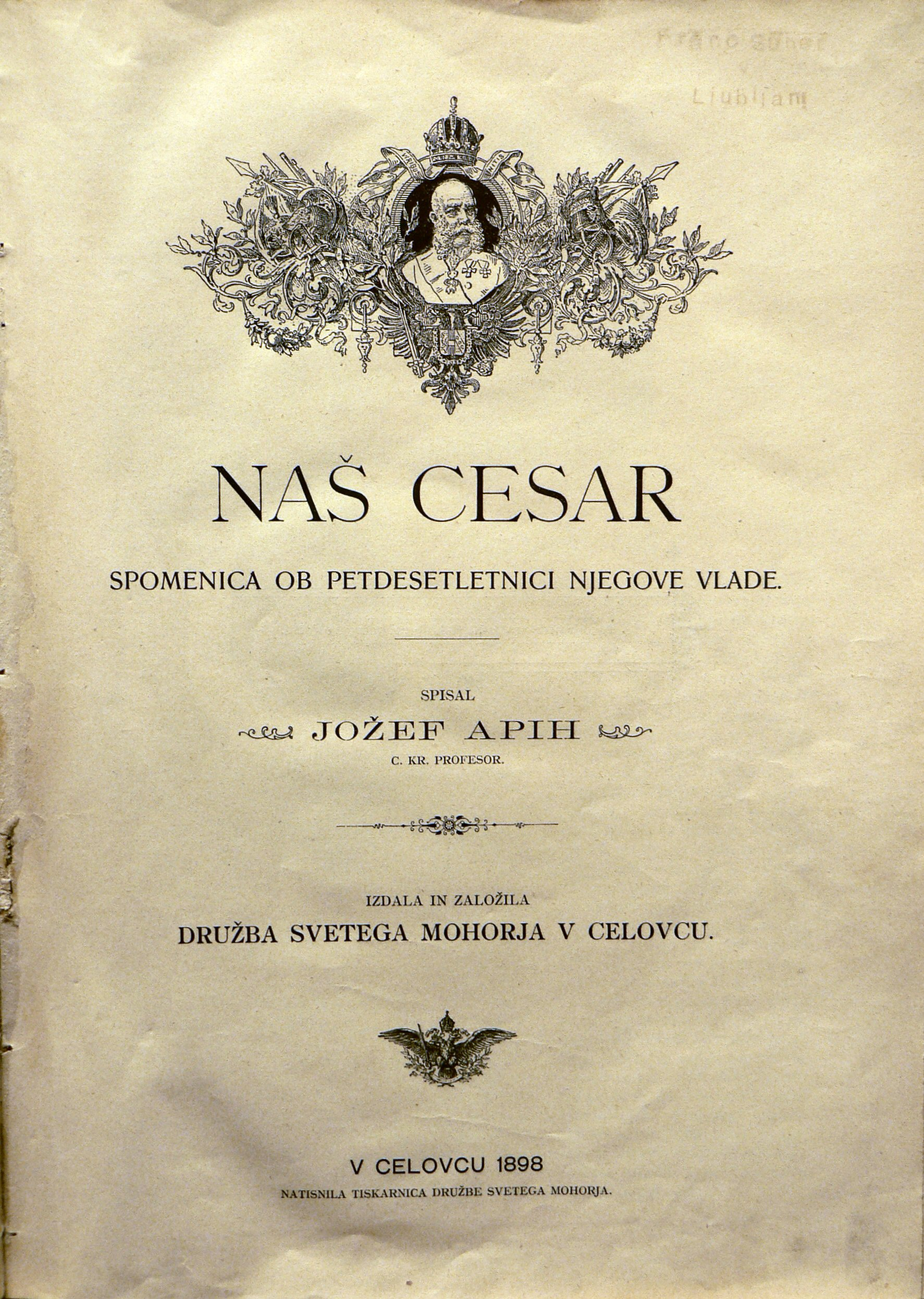 Naš Cesar. Spomenica ob Petdesetletnici Njegove Vlade (1898). Mestni Muzej Ljubljana .